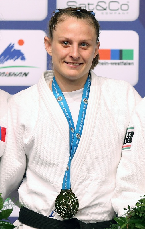 Дюссельдорф 2015. Золото